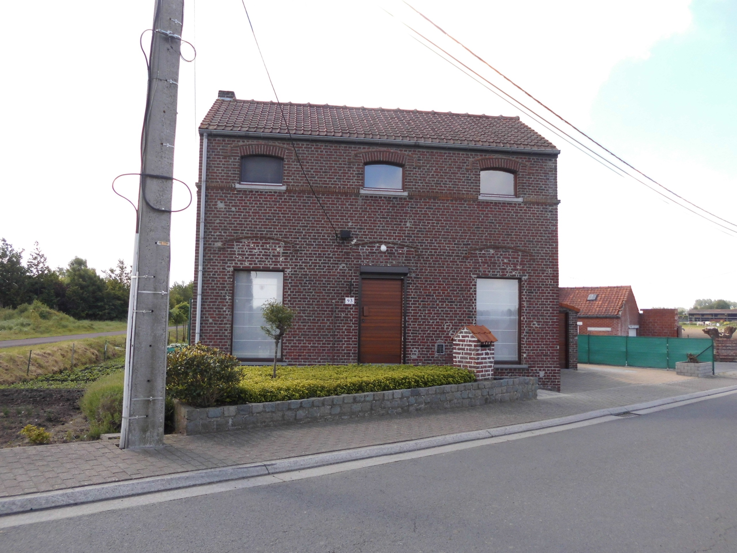 Bareelwachtershuis - Amersveldestraat - Kortemark - West-Vlanderen - België. Nabij de voormalige spoorlijn Line 63 (Infrabel)